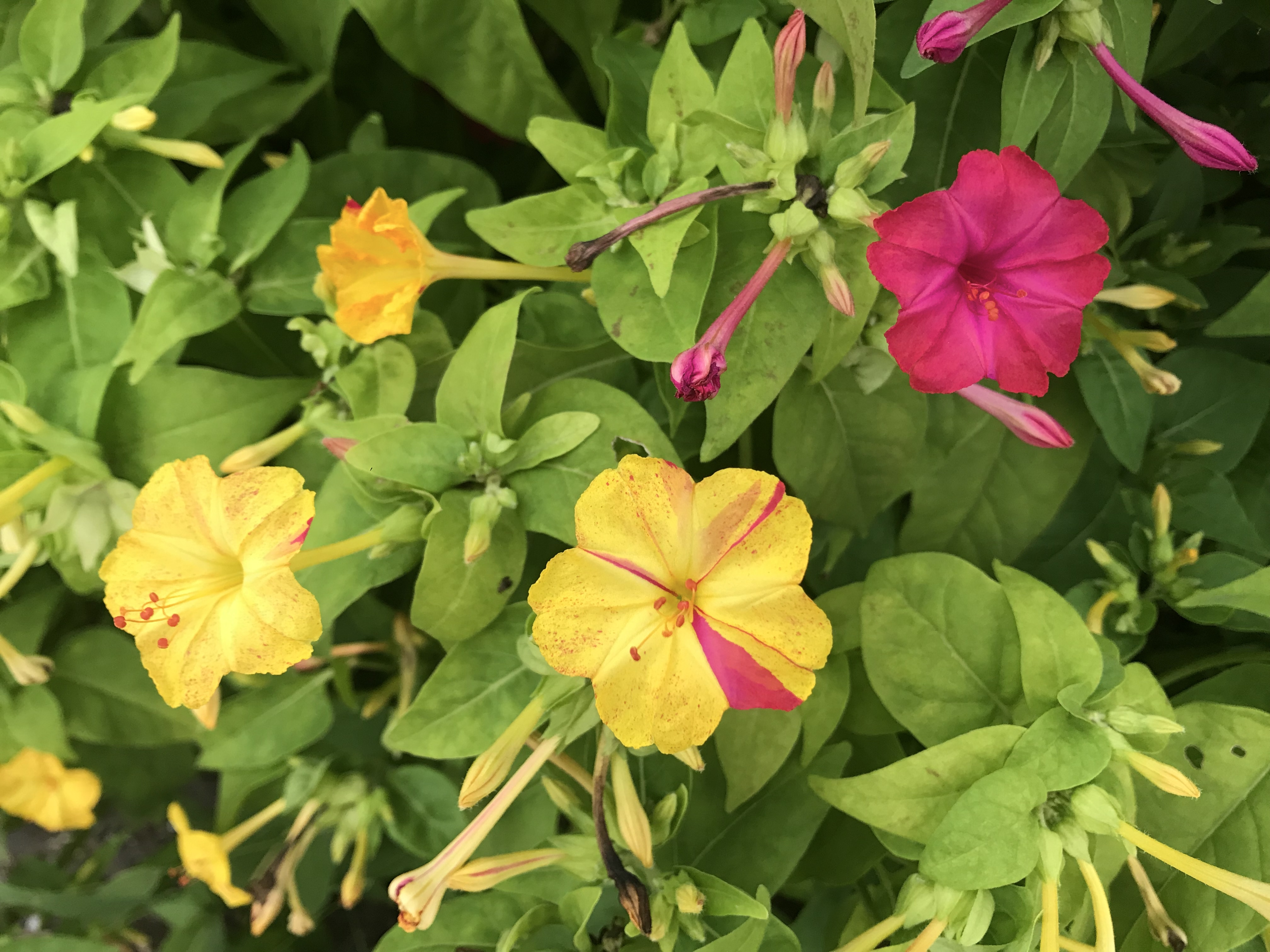 オシロイバナの花